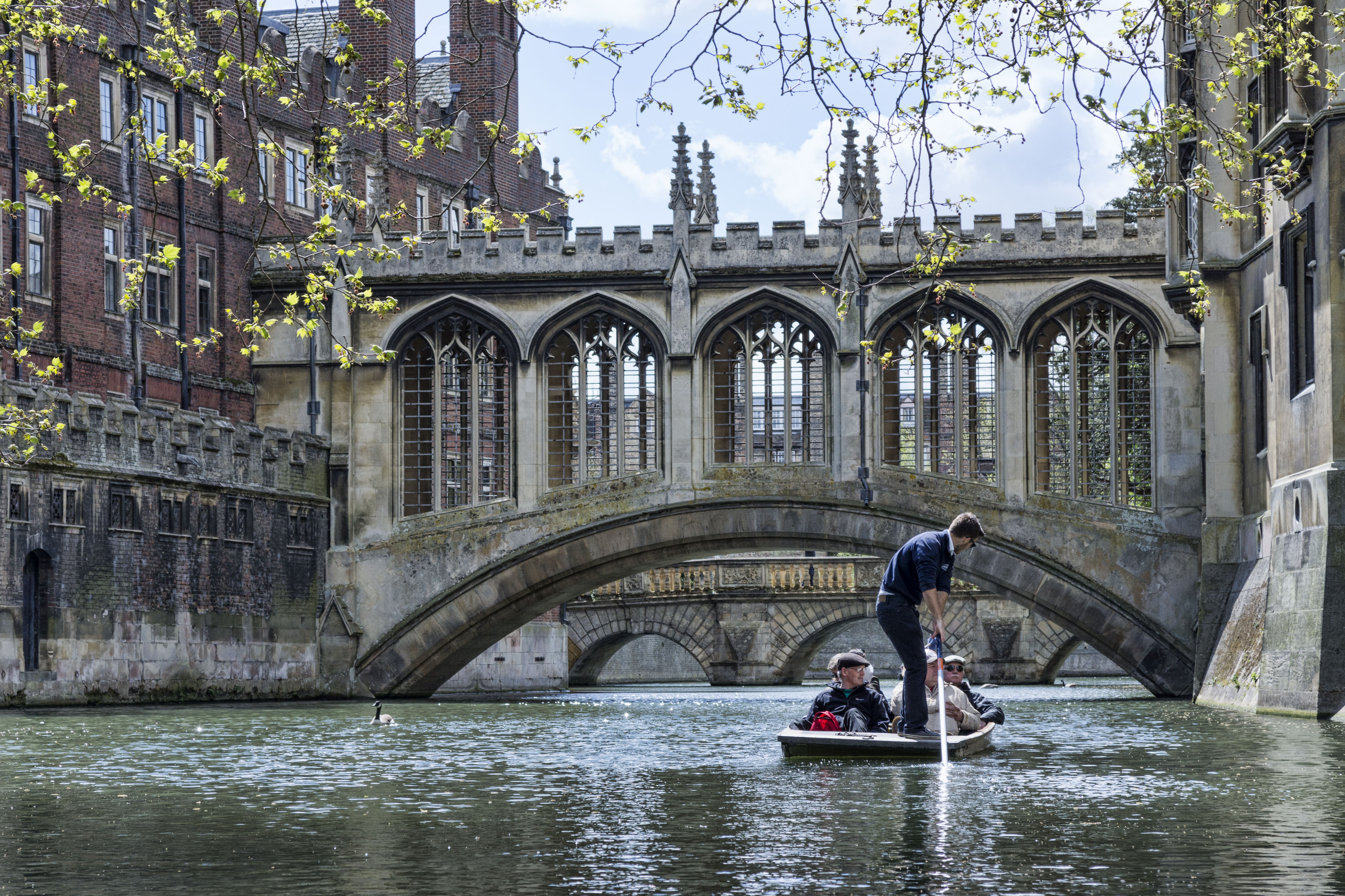 Le "pont des soupirs" de Cambridge (St John College)